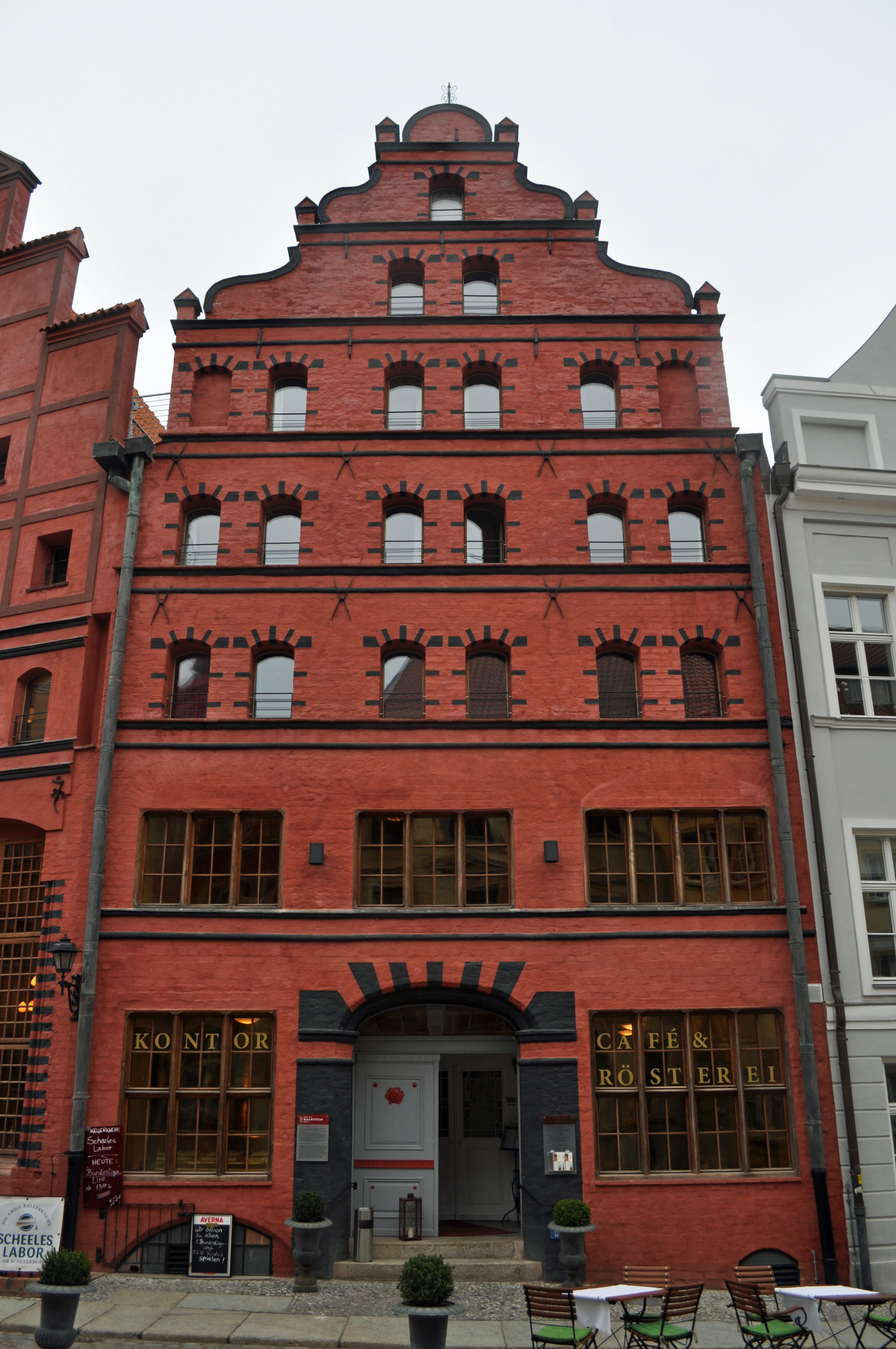 Gebäude bzw. Gebäudedetail in Stralsund. Straße und Hausnummer siehe Dateiname.